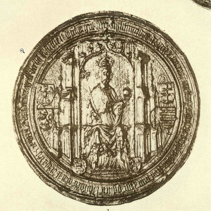 This is a scan of the historical document: Title: Die Siegel der deutschen Kaiser und Könige v. 2 (1347 - 1493)